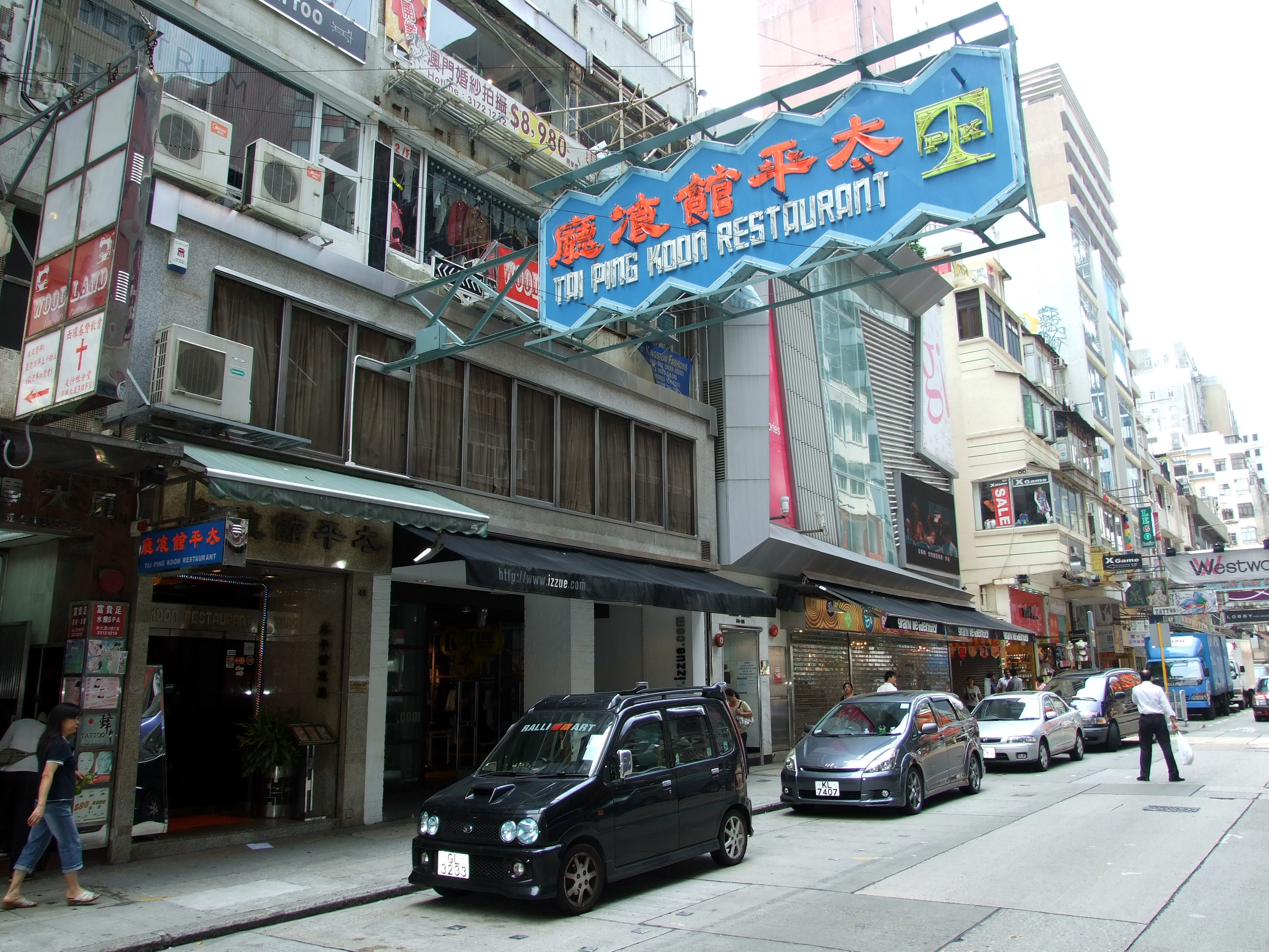 中文（香港）: 太平館尖沙咀分店